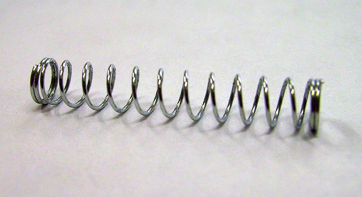 Feder aus einem Kugelschreiber in Nahaufnahme